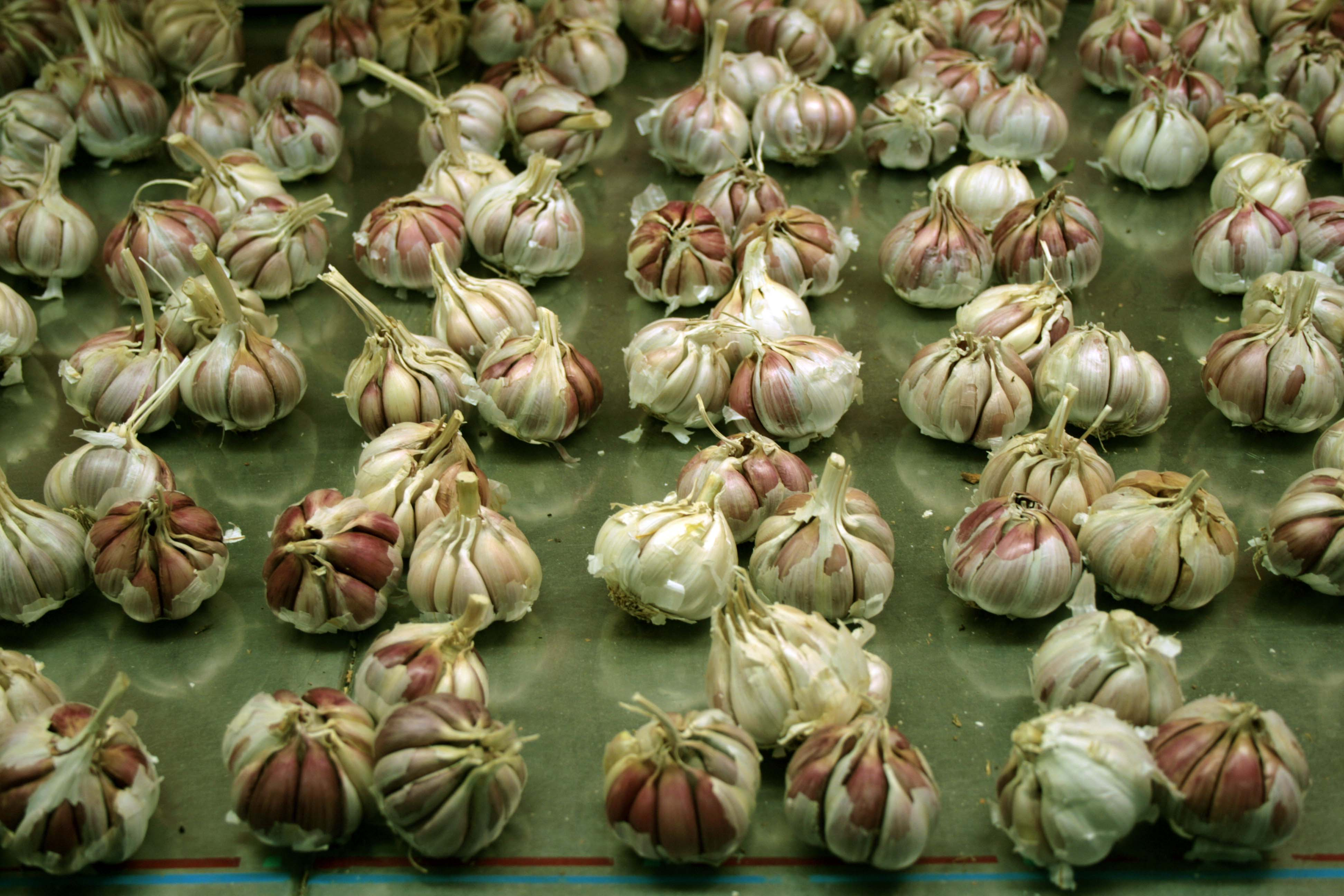 Allium sativum